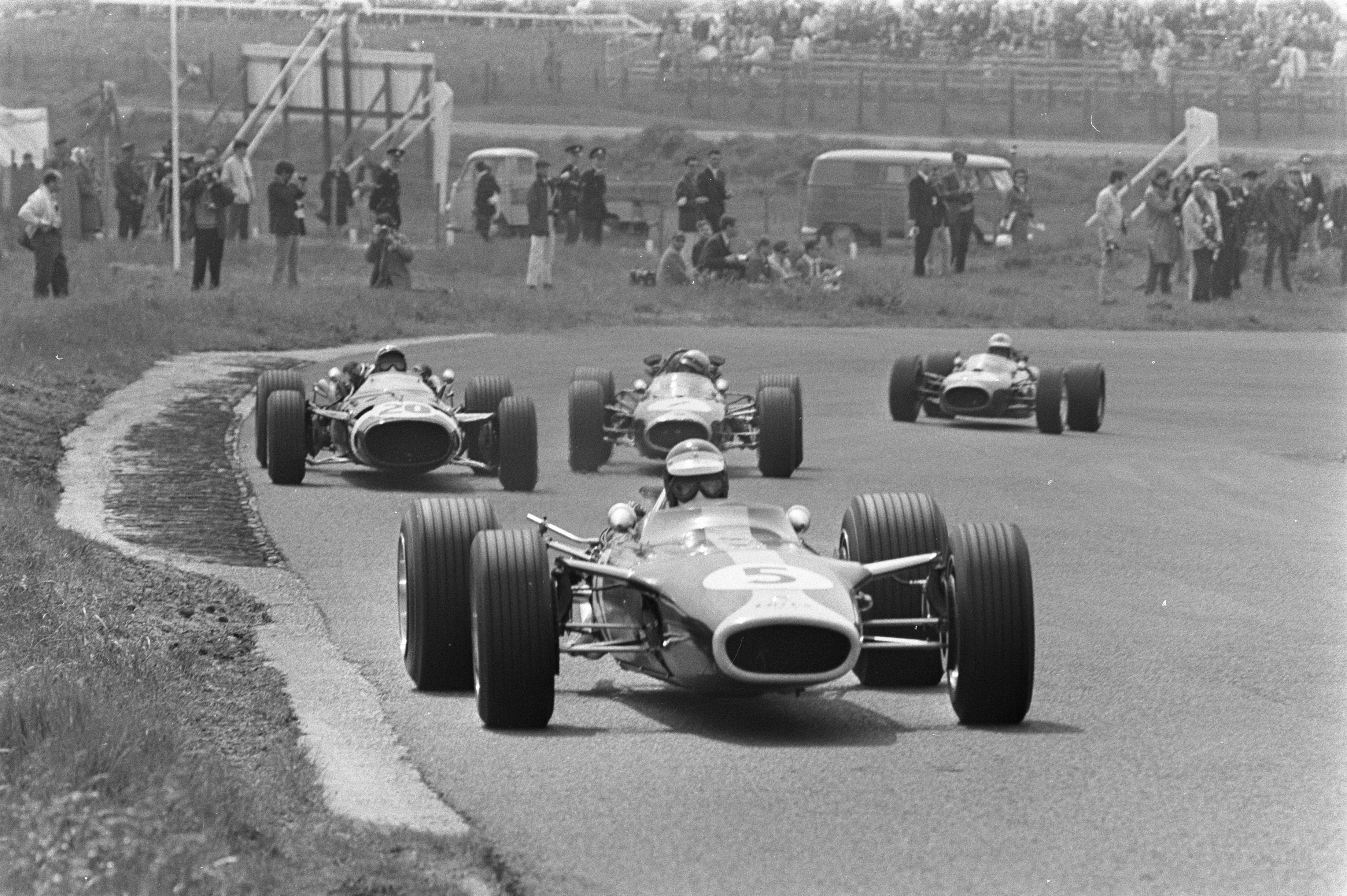 Collectie / Archief : Fotocollectie Anefo Reportage / Serie : [ onbekend ] Beschrijving : Grand Prix te Zandvoort, Jim Clark (winnaar) op kop, daarachter v.l.n.r. Jo Siffert , Brabham en Stewart Datum : 4 juni 1967 Locatie : Noord-Holland, Zandvoort Persoonsnaam : Brabham, Jim Clark Fotograaf : Koch, Eric / Anefo Auteursrechthebbende : Nationaal Archief Materiaalsoort : Negatief (zwart/wit) Nummer archiefinventaris : bekijk toegang 2.24.01.05 Bestanddeelnummer : 920-3784